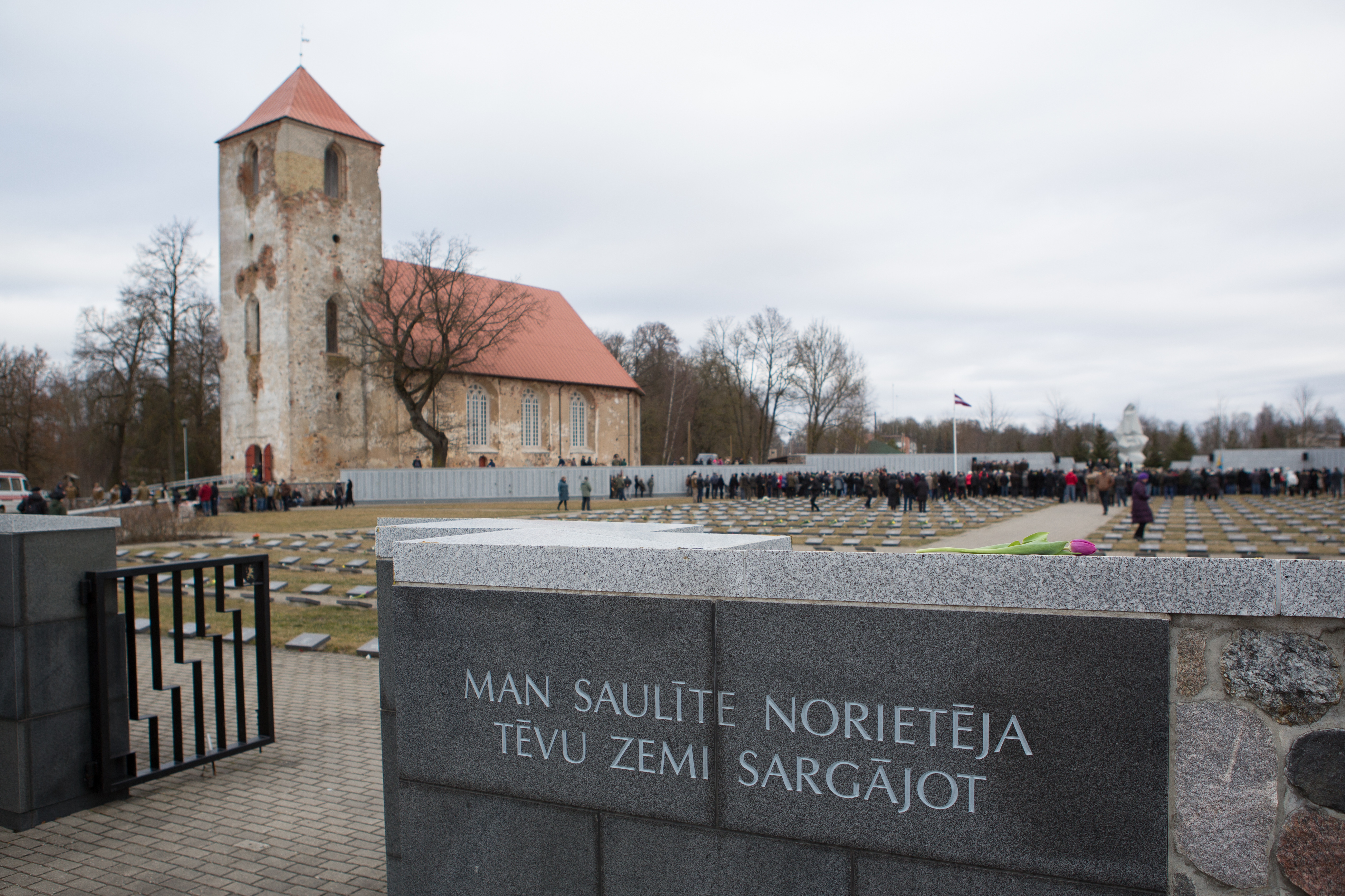 2016.gada 16.marts. Saeimas priekšsēdētāja Ināra Mūrniece Lestenes Brāļu kapos piedalās kritušo karavīru piemiņas pasākumā. Foto: Ernests Dinka, Saeimas Administrācija Izmantošanas noteikumi: saeima.lv/lv/autortiesibas